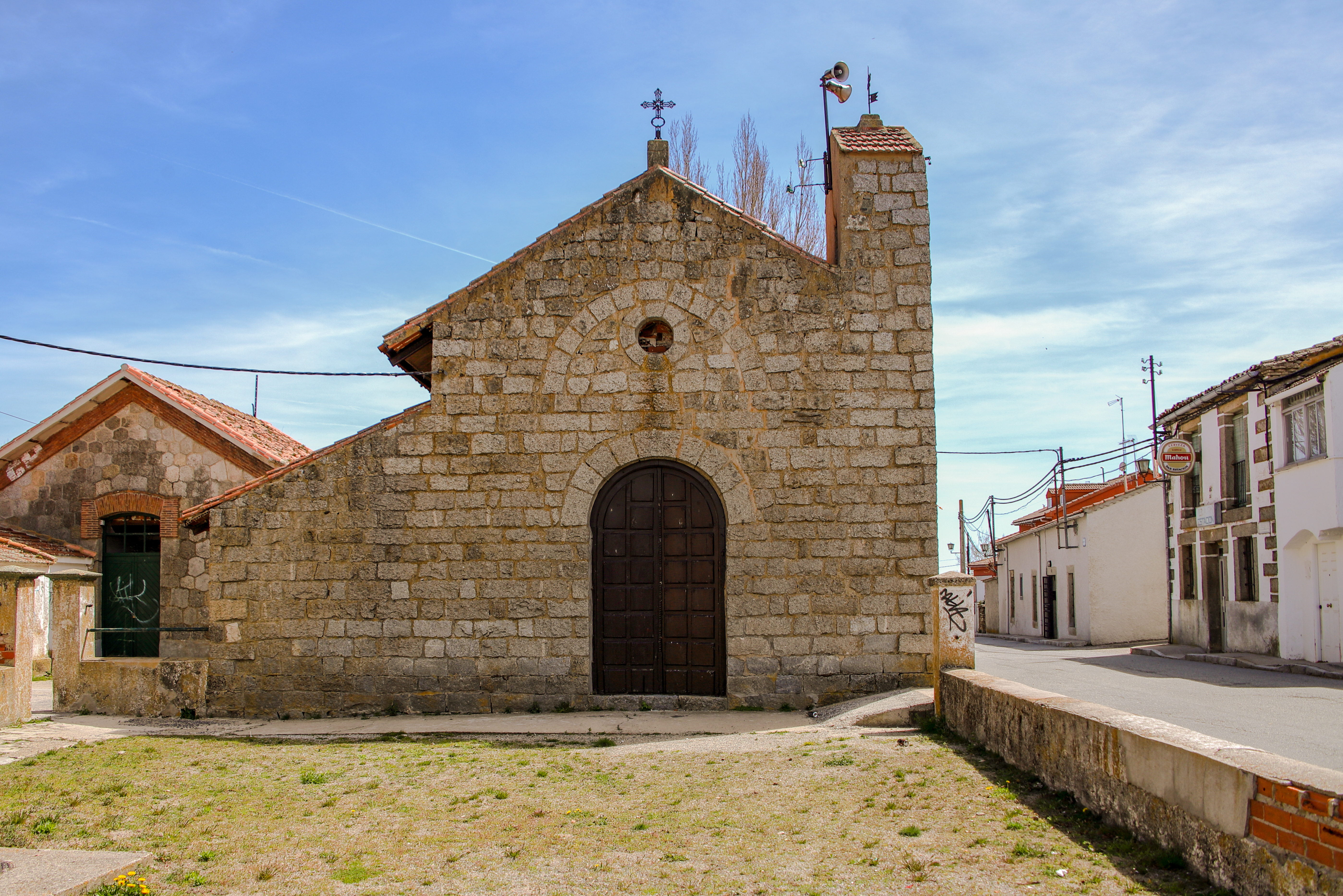 La Cañada es una localidad que pertenece al municipio de Herrandón de Pinaeres en la comarca de Ávila, provincia de Ávila.